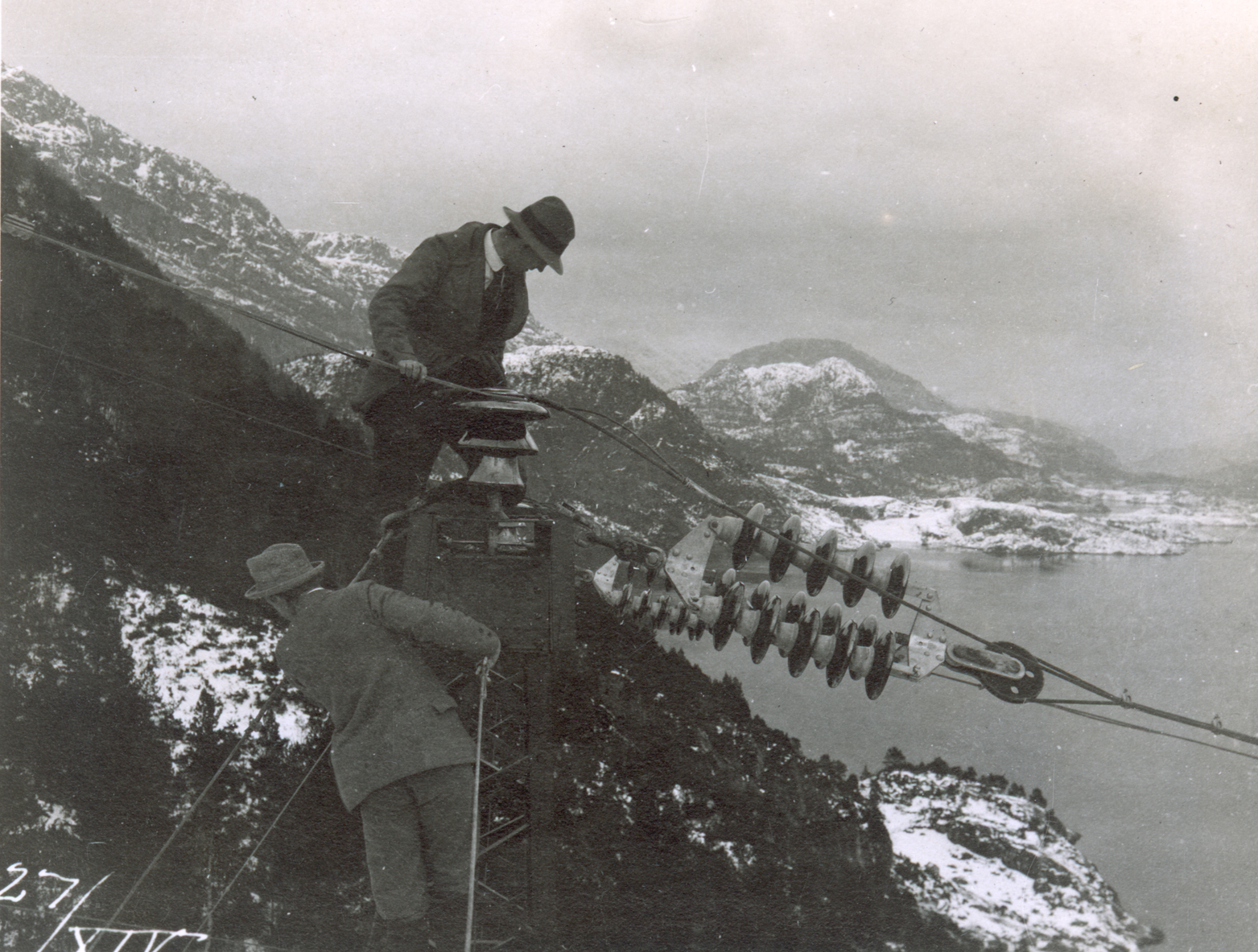 Spentmast over Nordalsfjorden (Aalfot interkommunalt kraftselskap). Elektrisitetsdirektoratet. Dato: xx.xx.xxxx